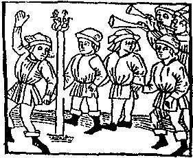 Wintertanz, Neidhart von Reuental